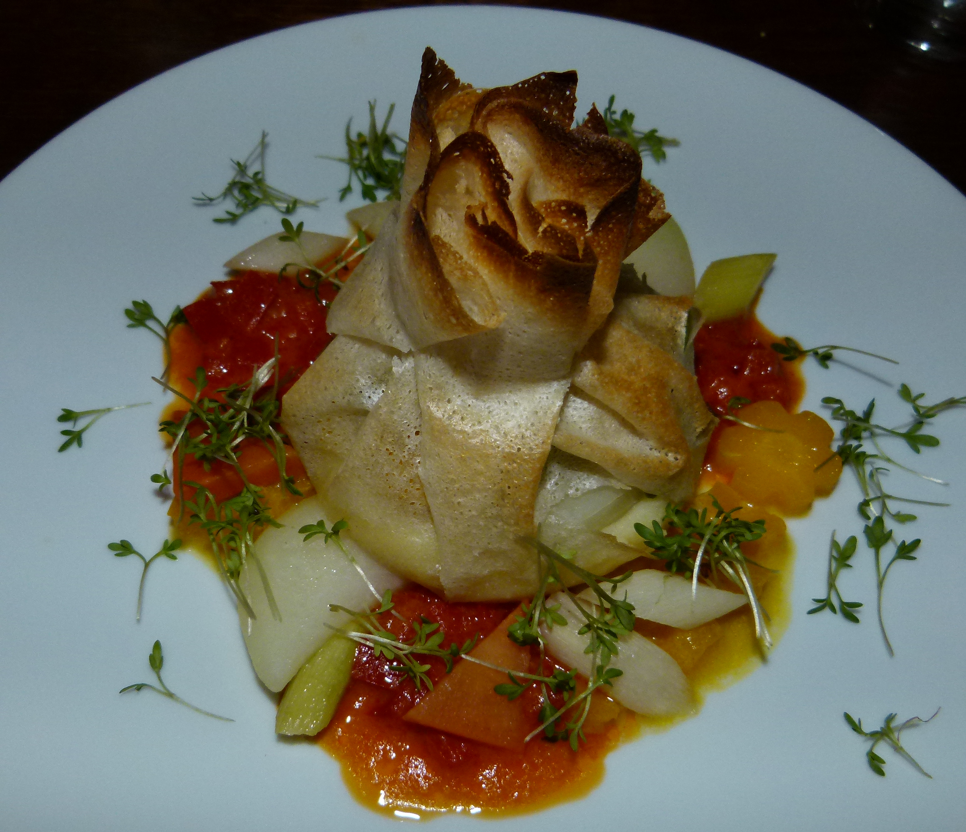 Veganes gebackenes Gemüsesäckchen, Restaurant Daniel, Dresden